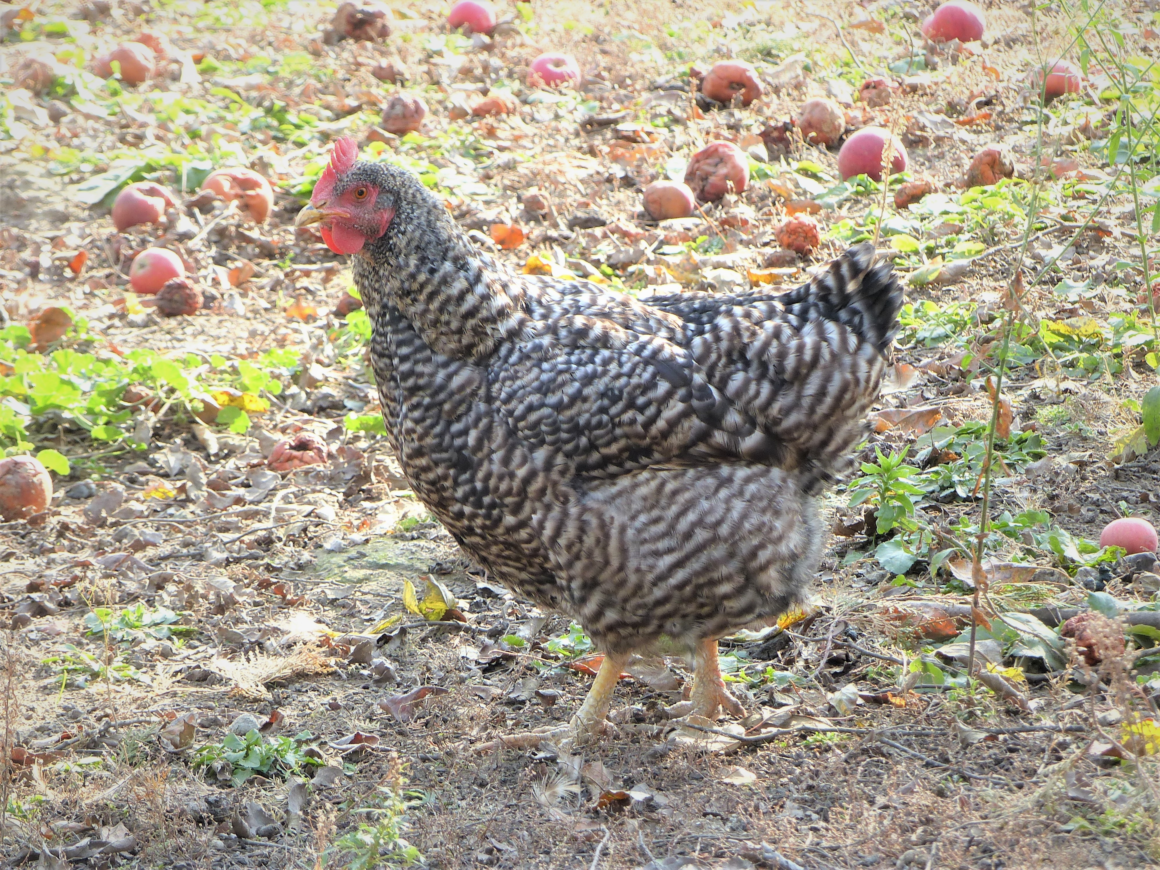 Kendermagos magyar tyúk. 2018. november 7-én Érden, a Sánchegyi utcában.